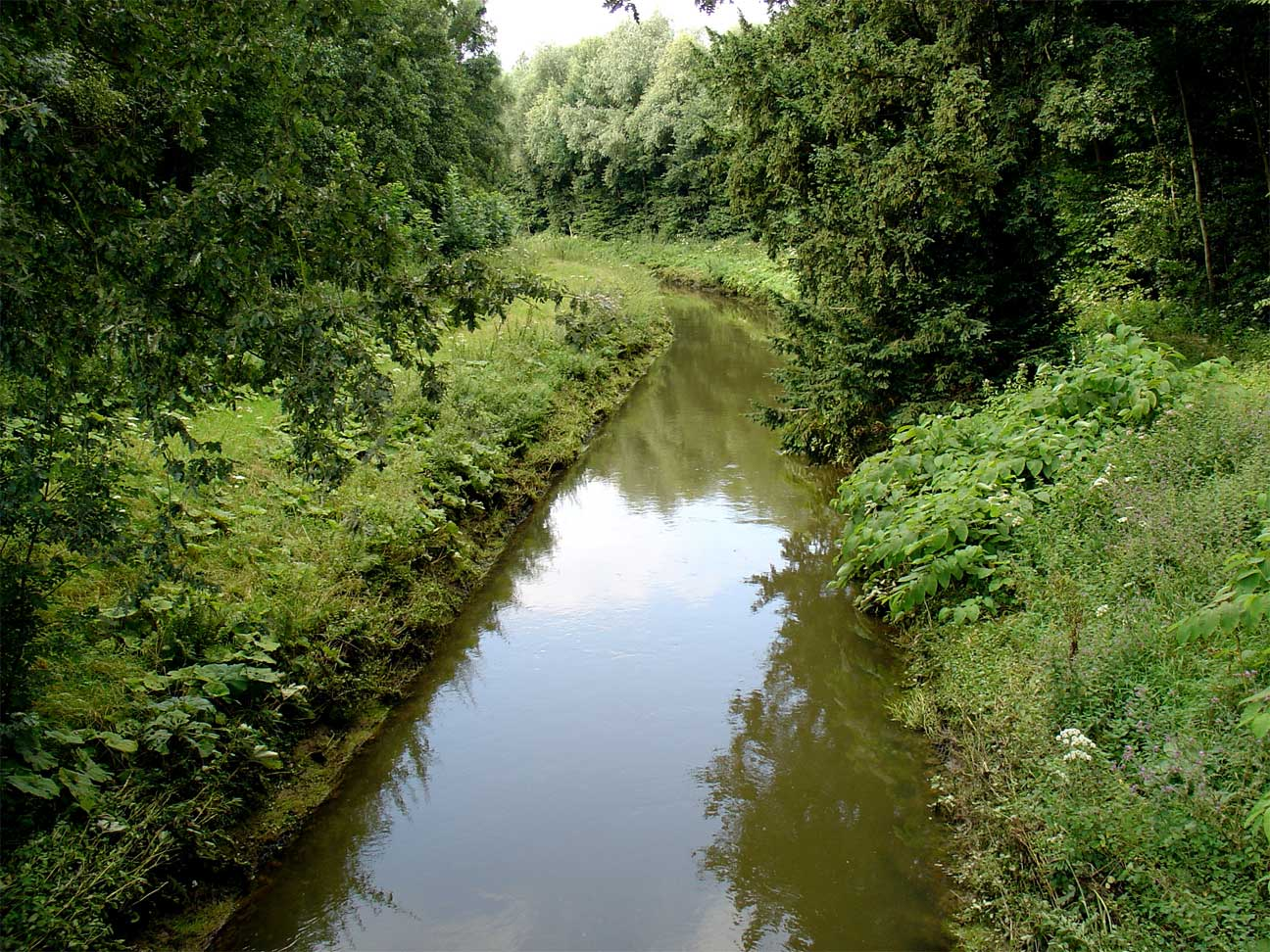 Geleenbeek bij Spaubeek (Limburg)